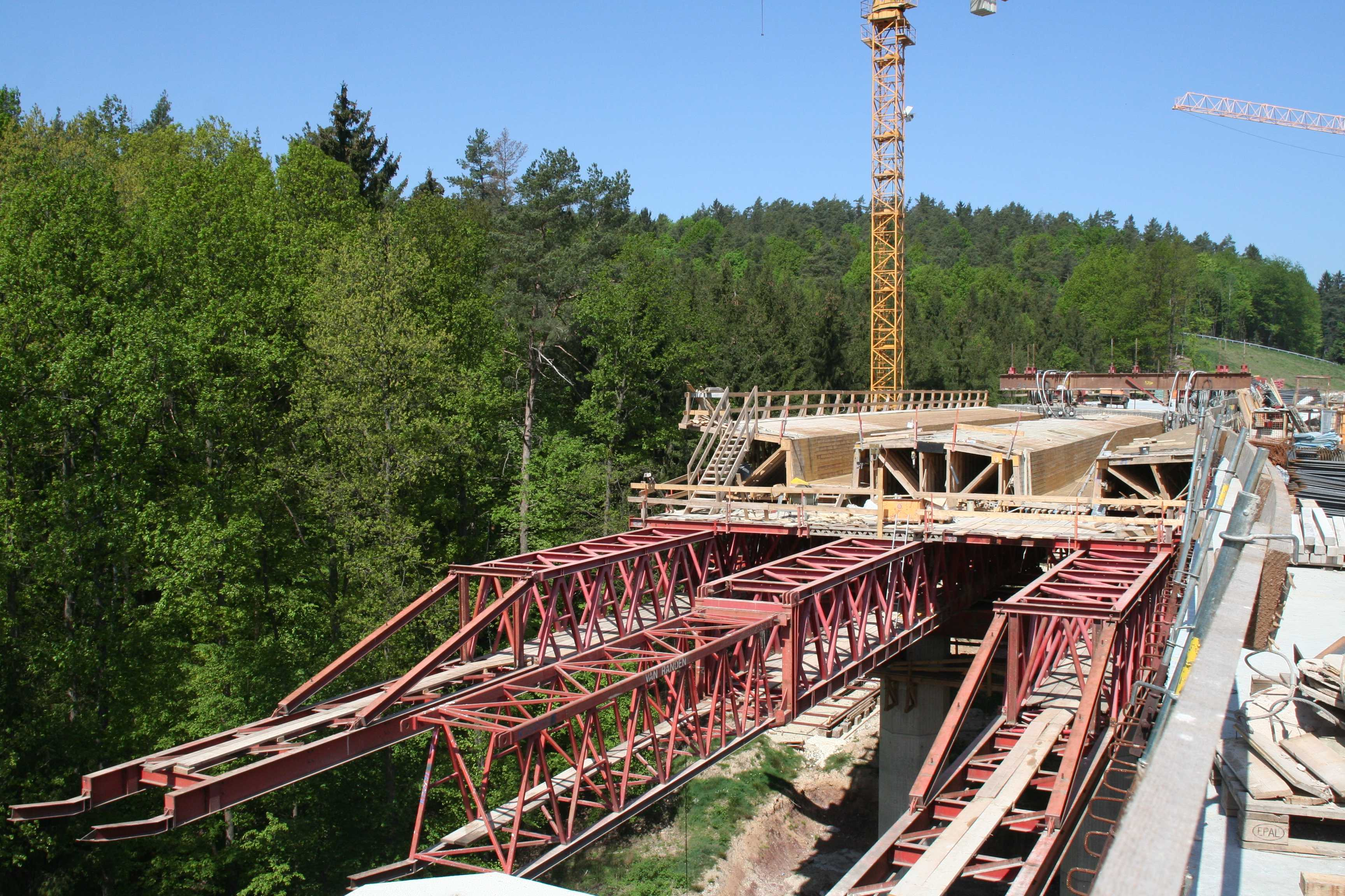 Talbrücke Nestelgraben, Bundesautobahn A73 bei Lichtenfels. Vorschubgerüst.